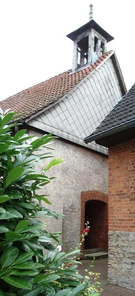 St. Georgkapelle Messenkamp